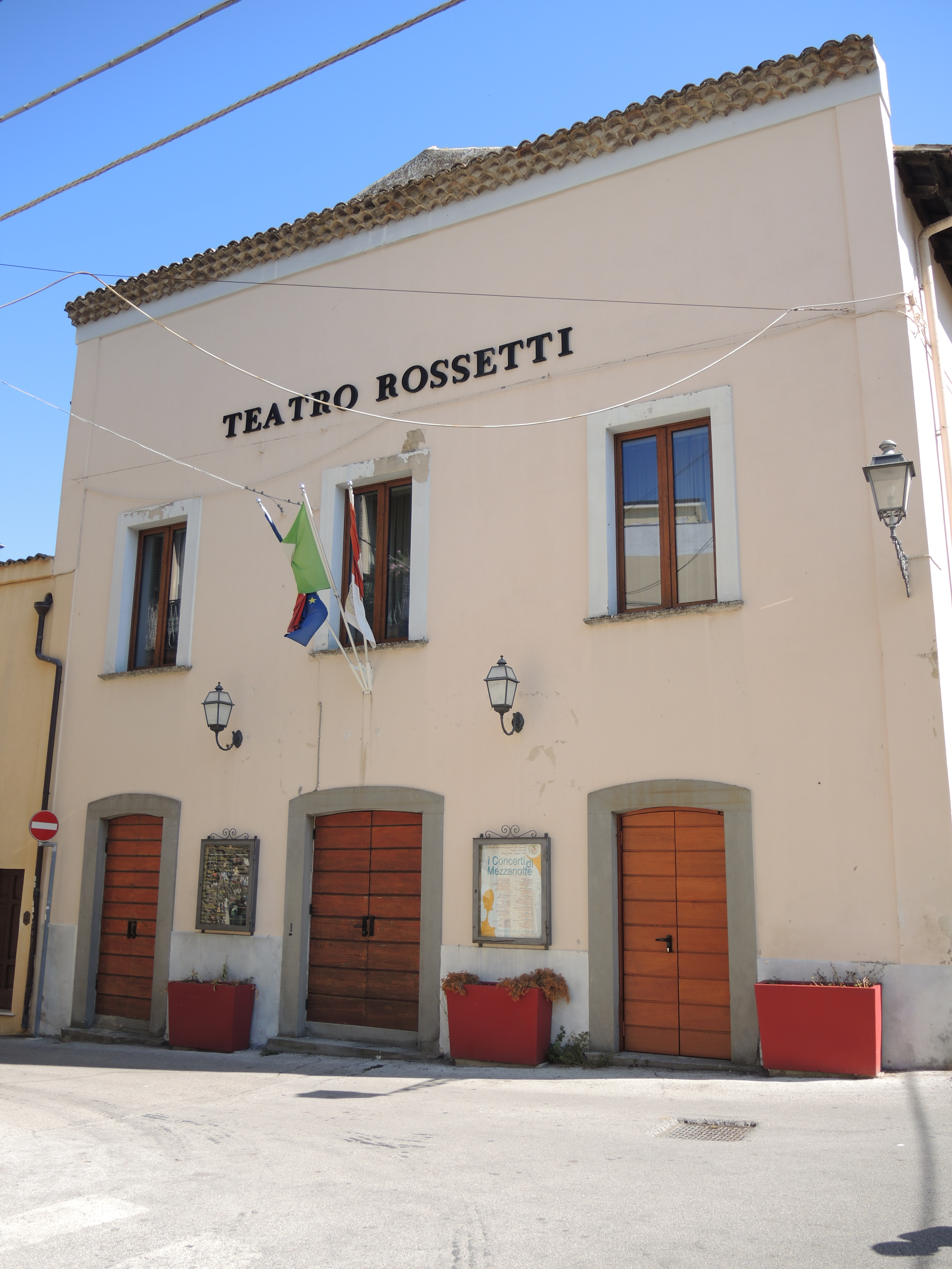 Teatro Rossetti This is a photo of a monument which is part of cultural heritage of Italy.